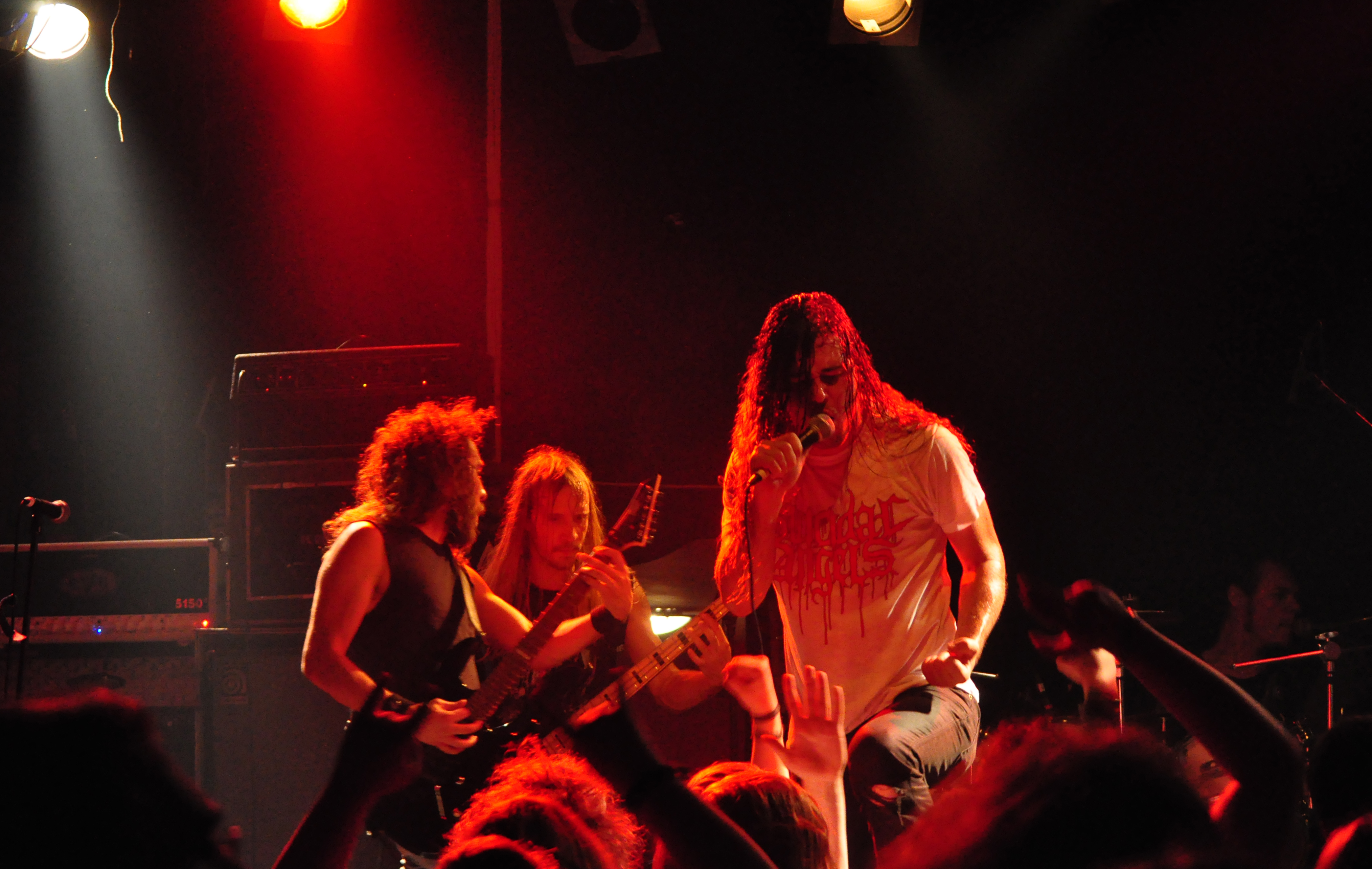 Warbringer in Rostock_6